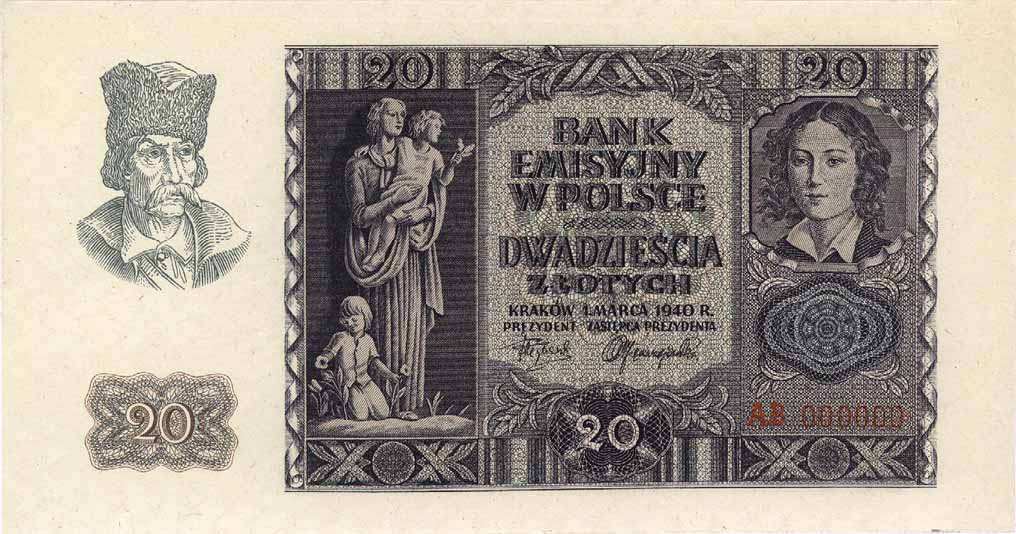 20 złotych = 10 Reichsmark